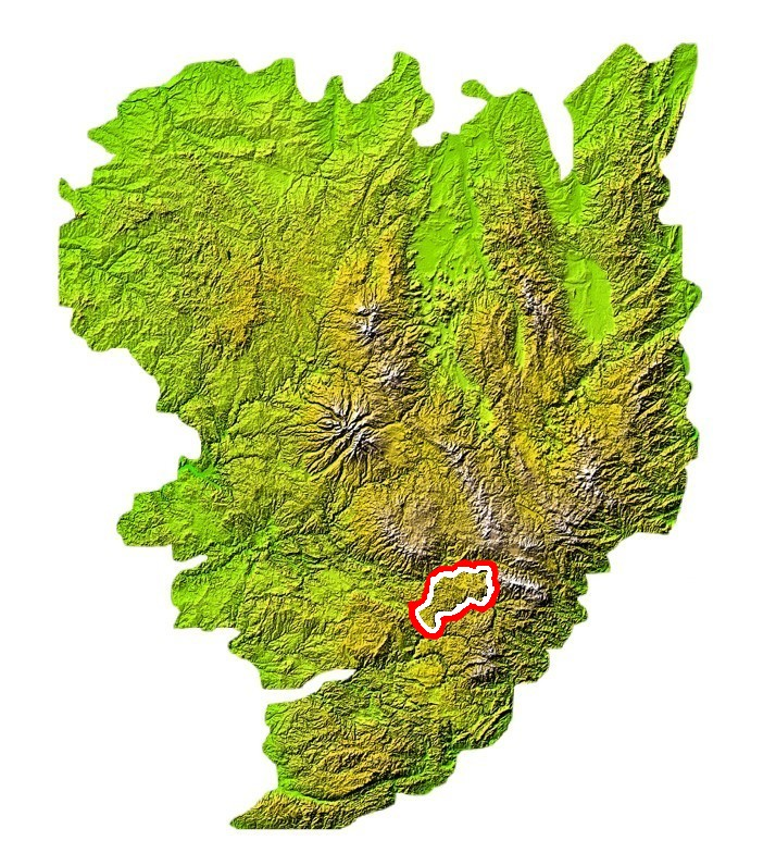 Localisation su causse de Sauveterre sur la carte du Massif central